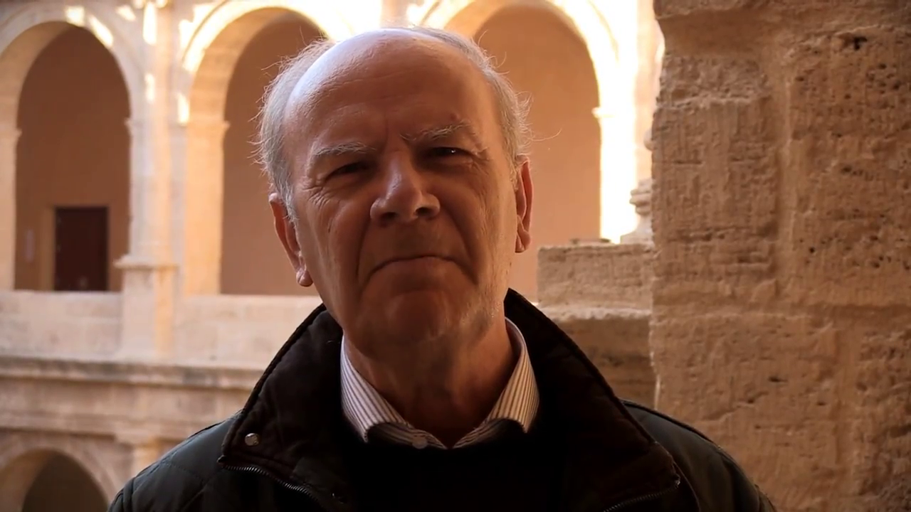 El President de l'AVL en un acte del dia del llibre valencià